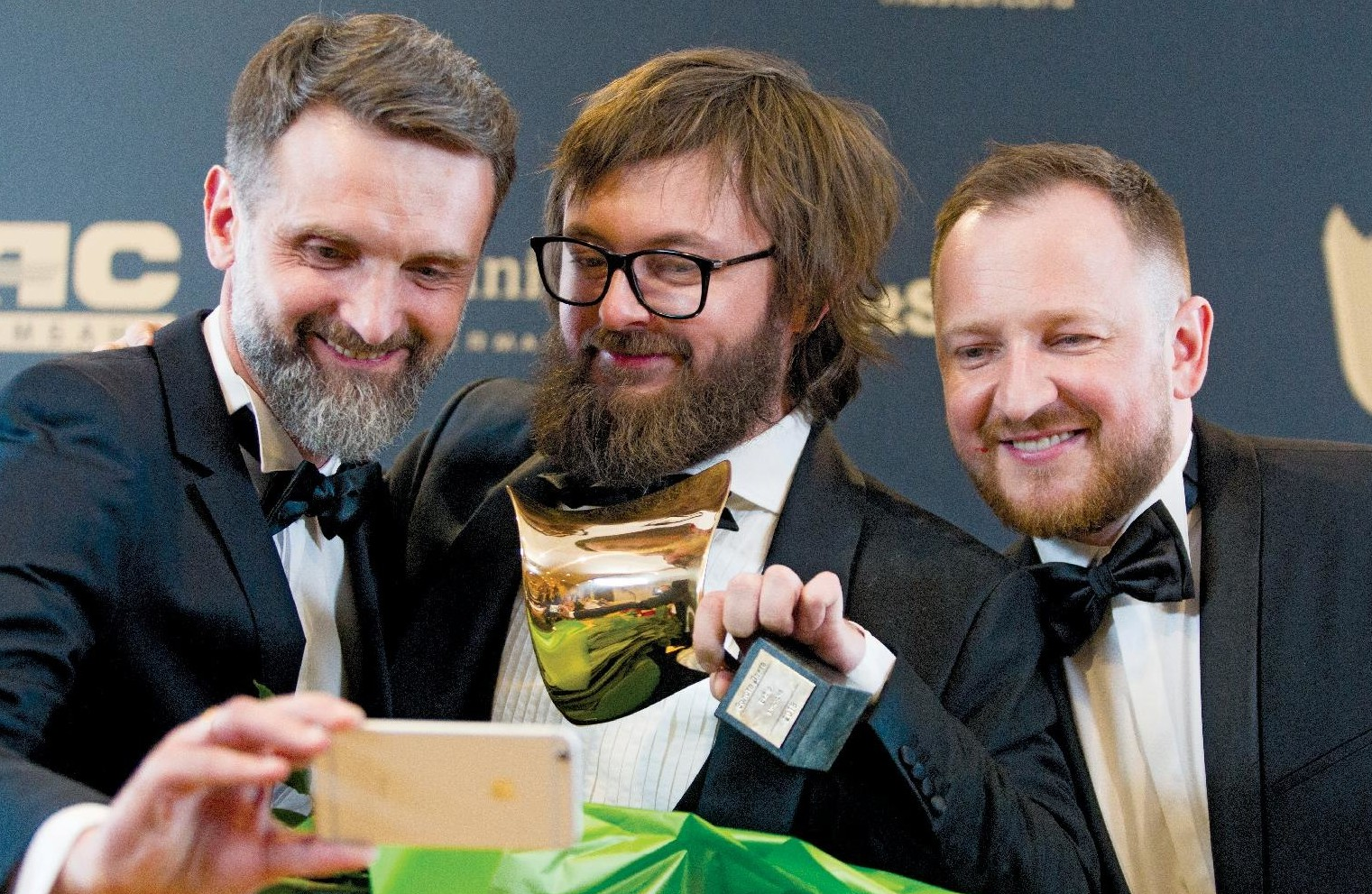 Обкладинка газети "Культура і життя", №18 за 04 травня 2018 року. Вибір глядача «Золотої Дзиґи» – фільм «Dzidzio Контрабас»